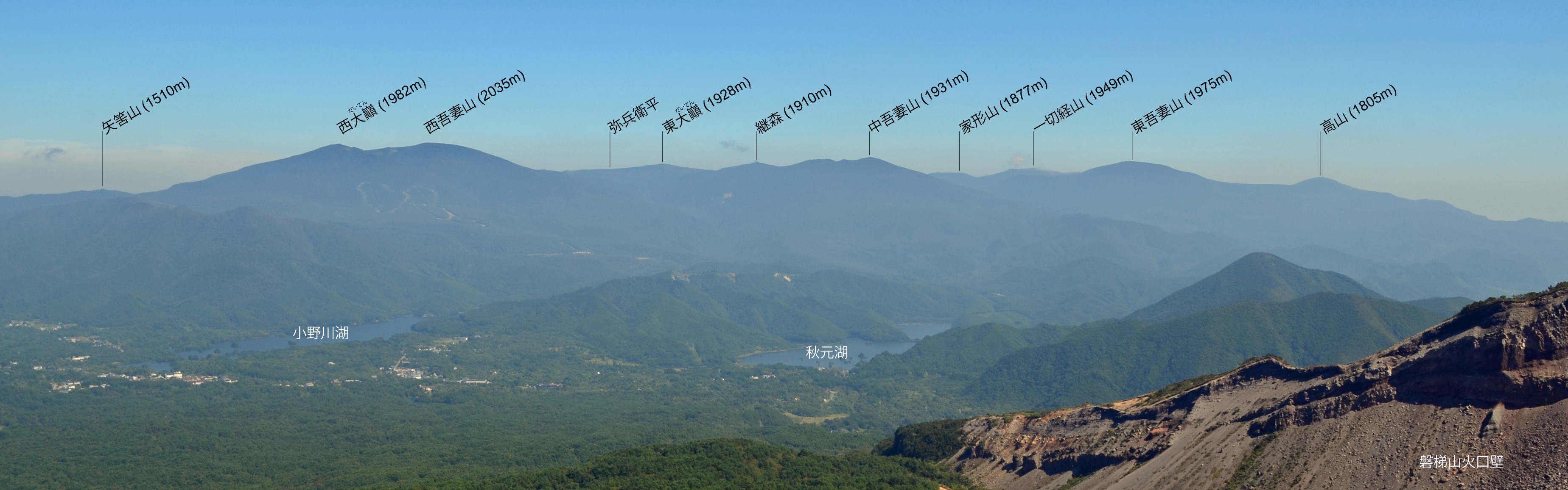 磐梯山より望む吾妻連峰の全体像 (標高が一部間違っていたため，修正して再アップロード)